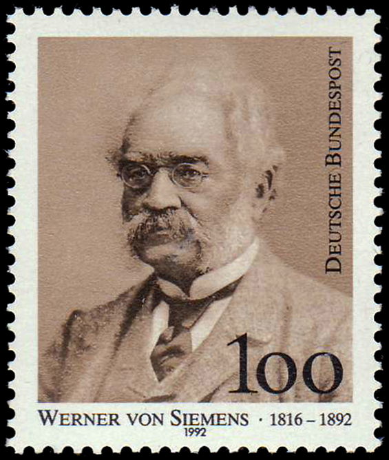 Stamp of Germany, Werner_von_Siemens, 1992